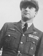 Ricardo Dyrgalla em 1945